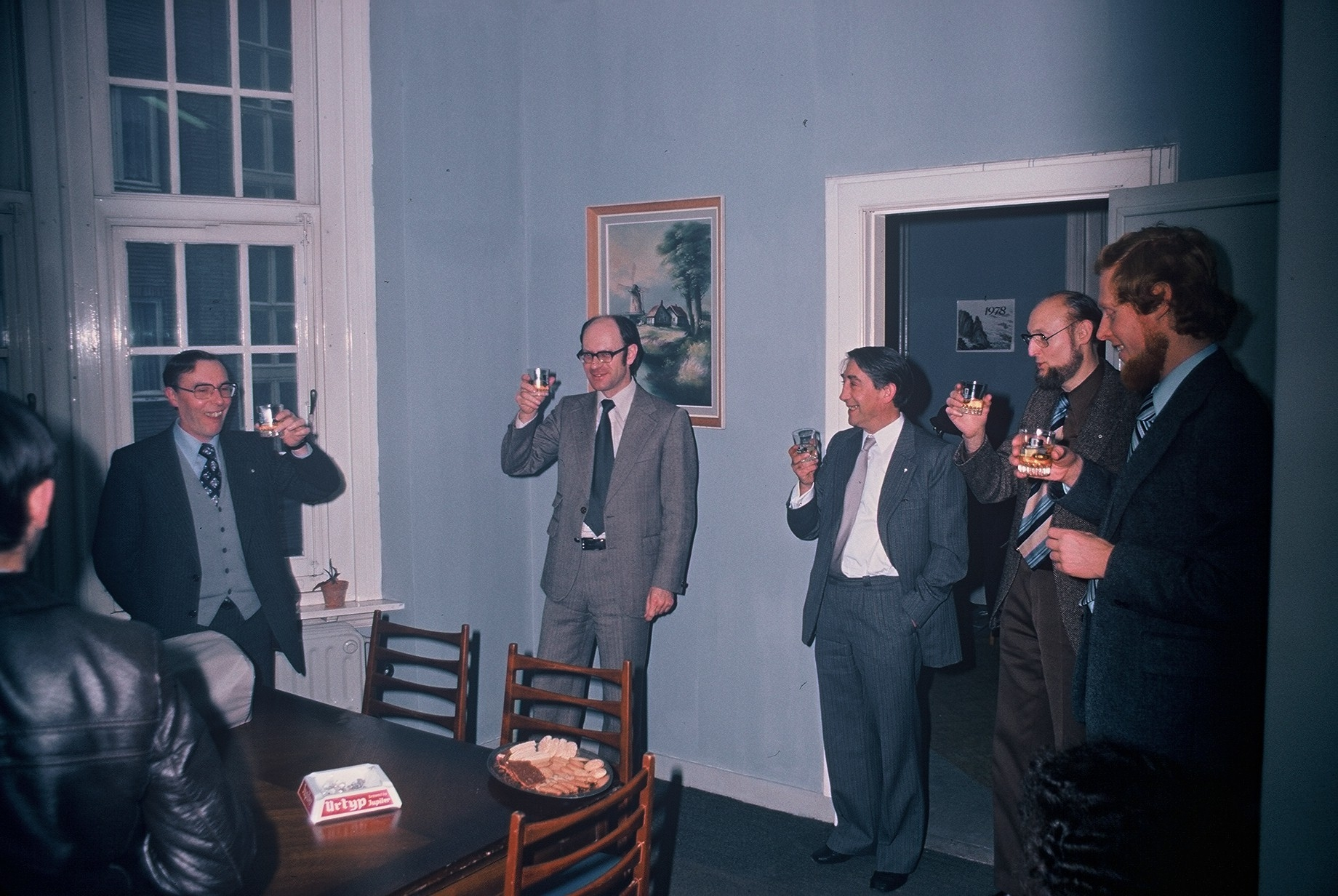 Akcepto okaze de la malfermo de GCA en Antverpeno, fine de 1977. Propra foto.